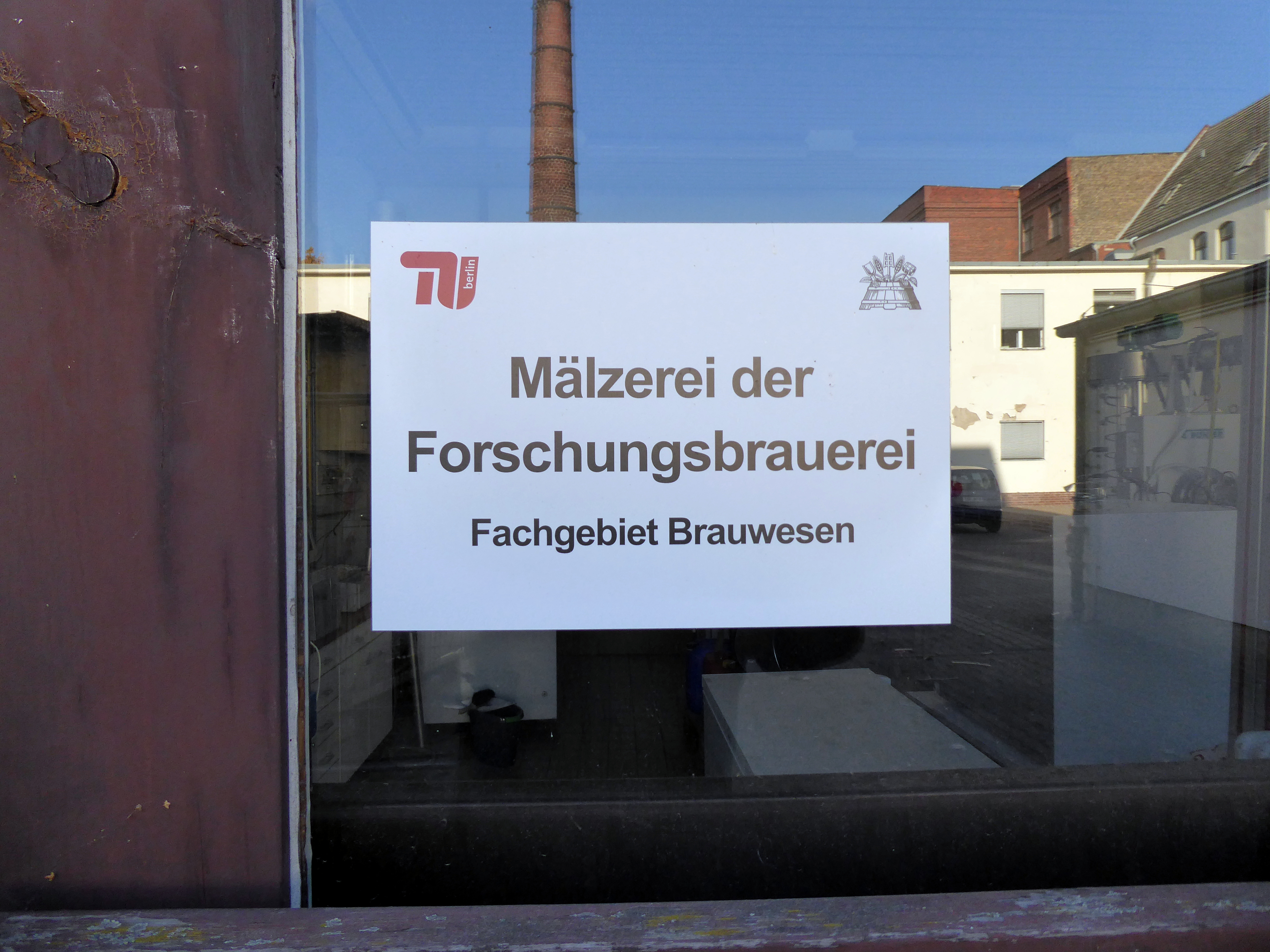 Forschungsbrauerei der TU Eingang